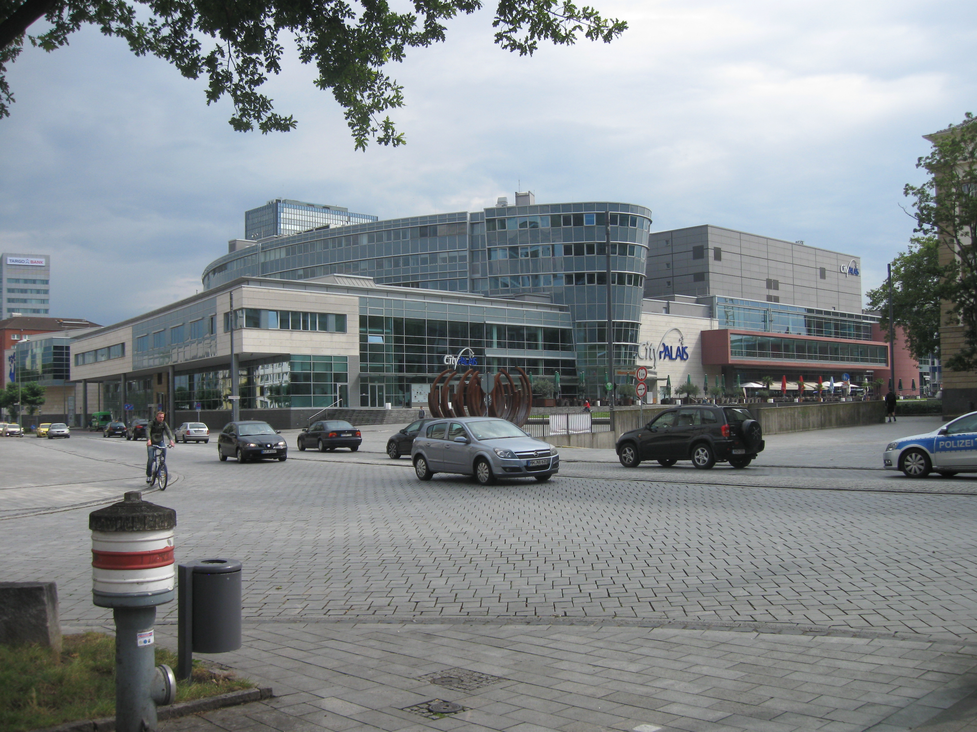 Nave comercial en el centro de Duisburgo